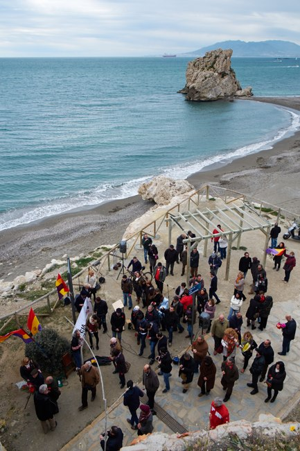 Homenaje a las victimas de la carretera de Almeria celebrado en Málaga, playa del Peñón del Cuervo, el 15-2-2015